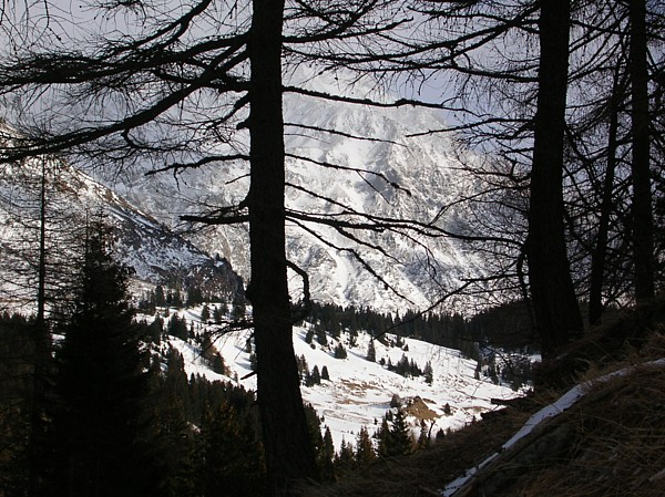 Valle Mesolcina in de buurt van San Bernardino